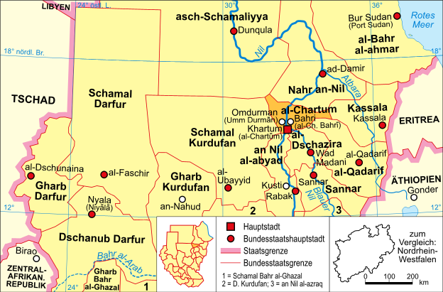 politische Karte des Sudan (Bundesstaat al-Chartum)